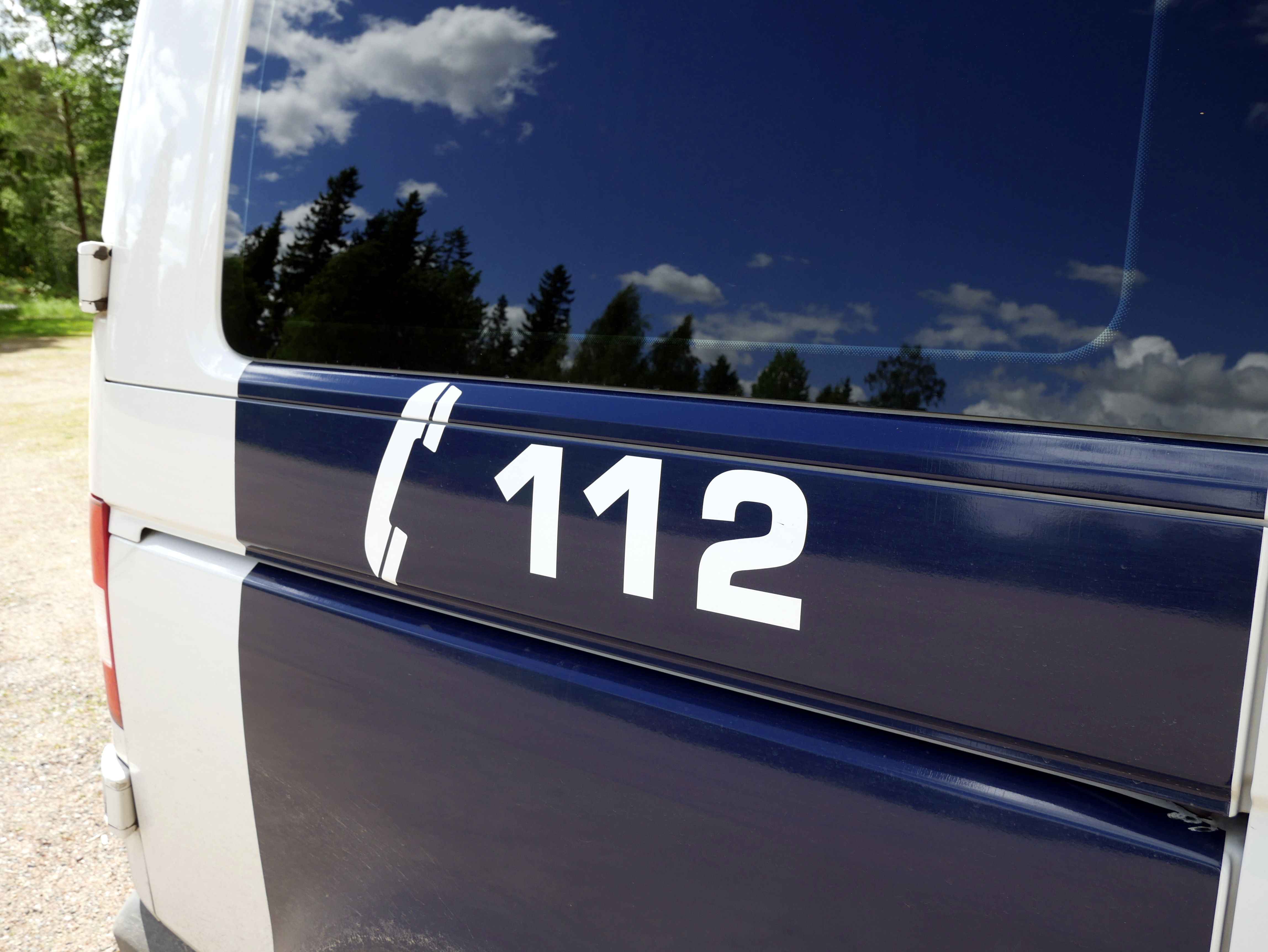 112 hätänumero suomalaisen poliisiauton kyljessä.